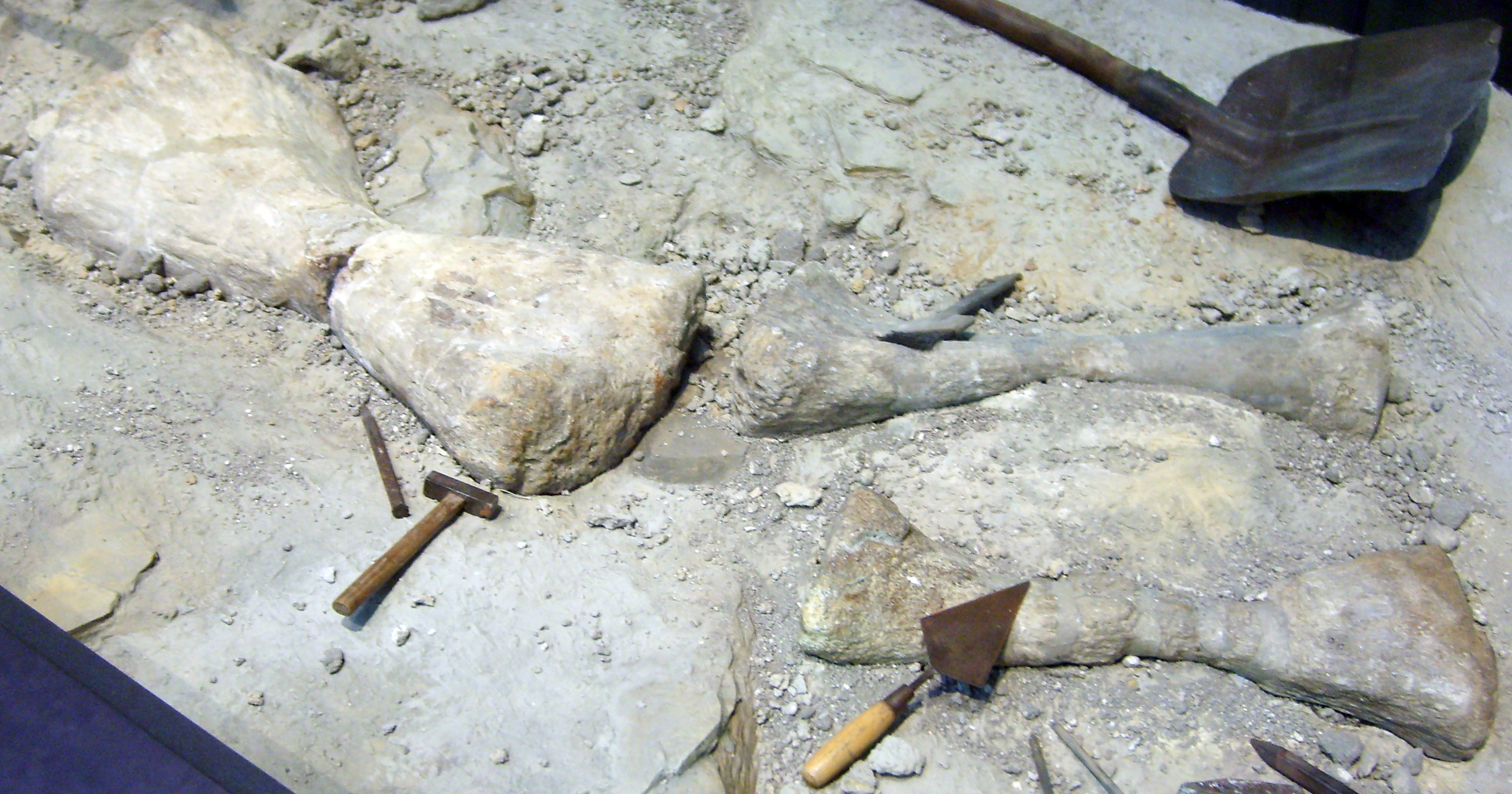 Janenschia robusta humerus, radius and ulna at the Museum für Naturkunde, Berlin.